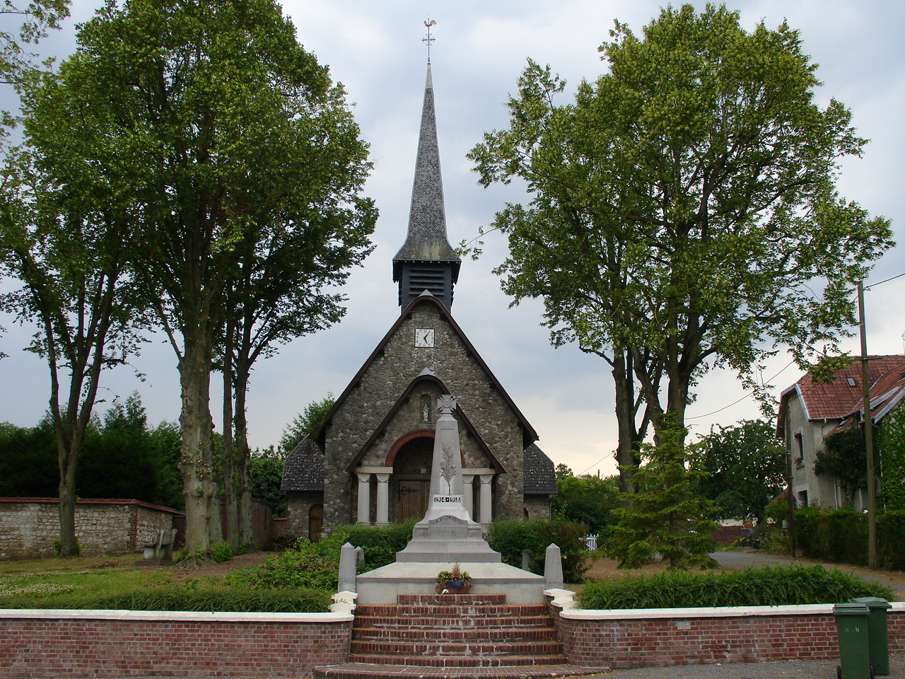 Église d'Hendecourt-lès-Ransart